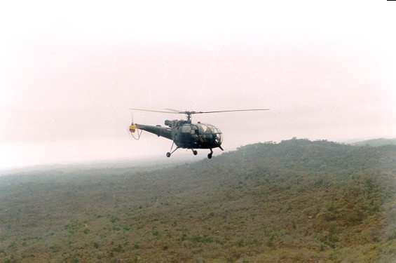 Alouette III de la Fuerza Aérea Ecuatoriana sobre los Andes Ecuatorianos